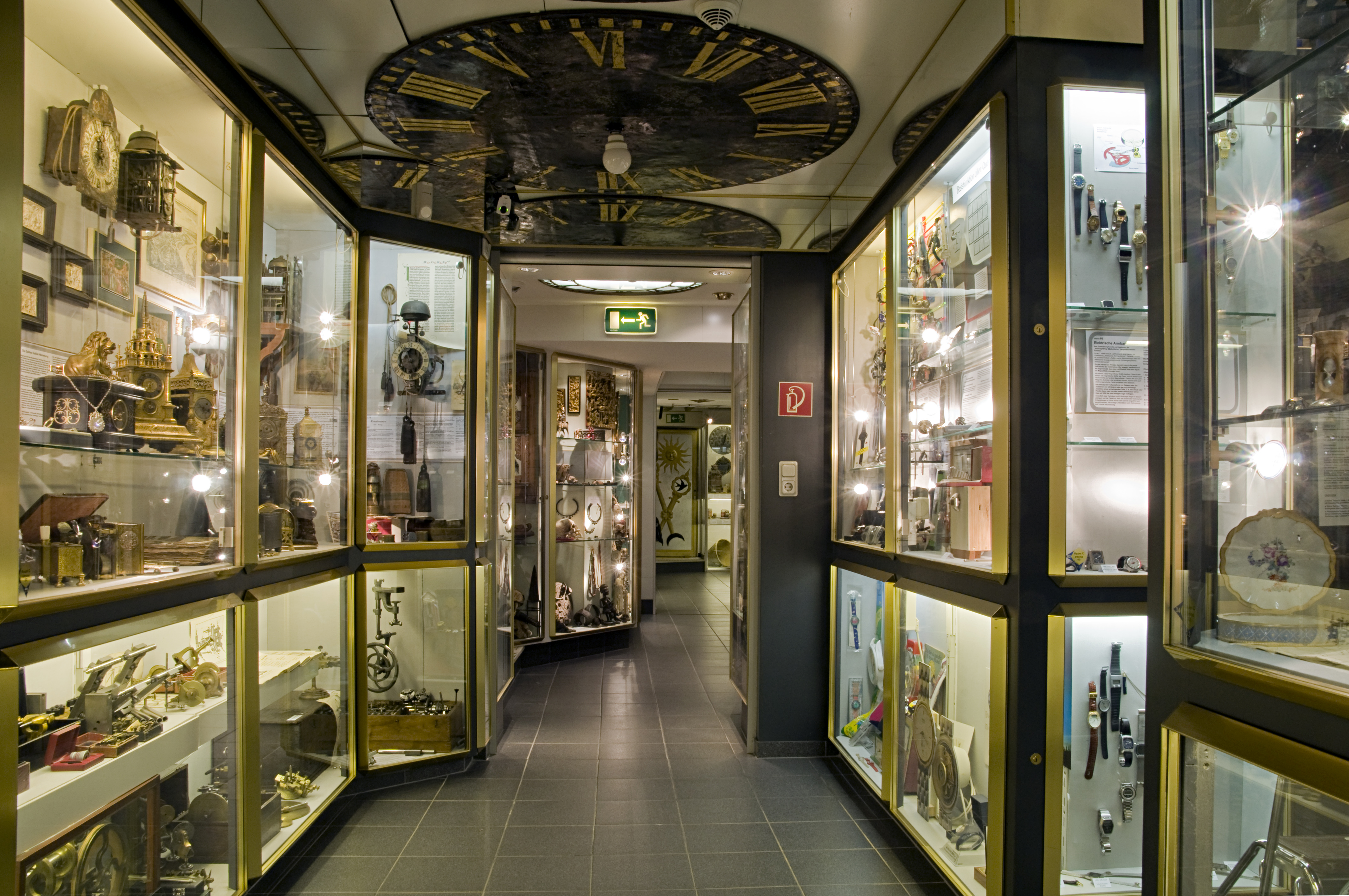 Museum für Uhren, Schmuck und Kunst Frankfurt am Main Ausstellungsräume B (Hintergrund) und C (Vordergrund)